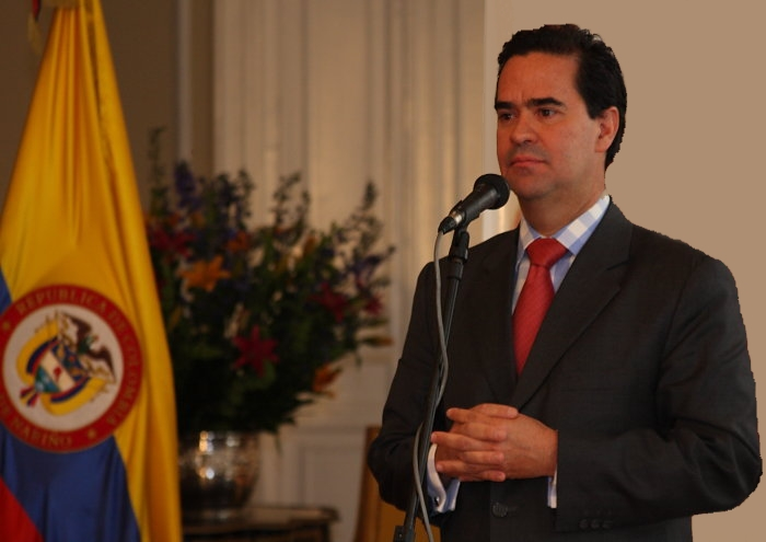 Frank Pearl durante su posesión como Ministro